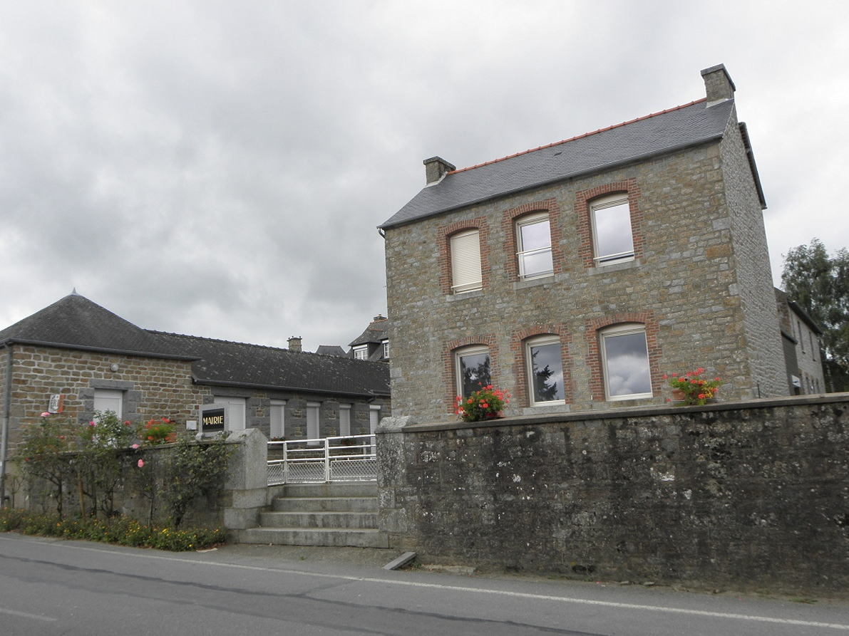 Mairie de Baillé (35)